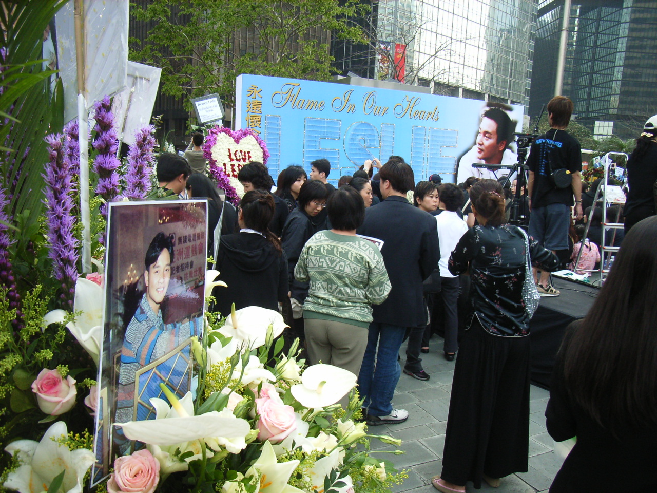 Mr Leslie Cheung, 張國榮逝世周年紀念日 2006年4月1日 香港 中環康樂廣場